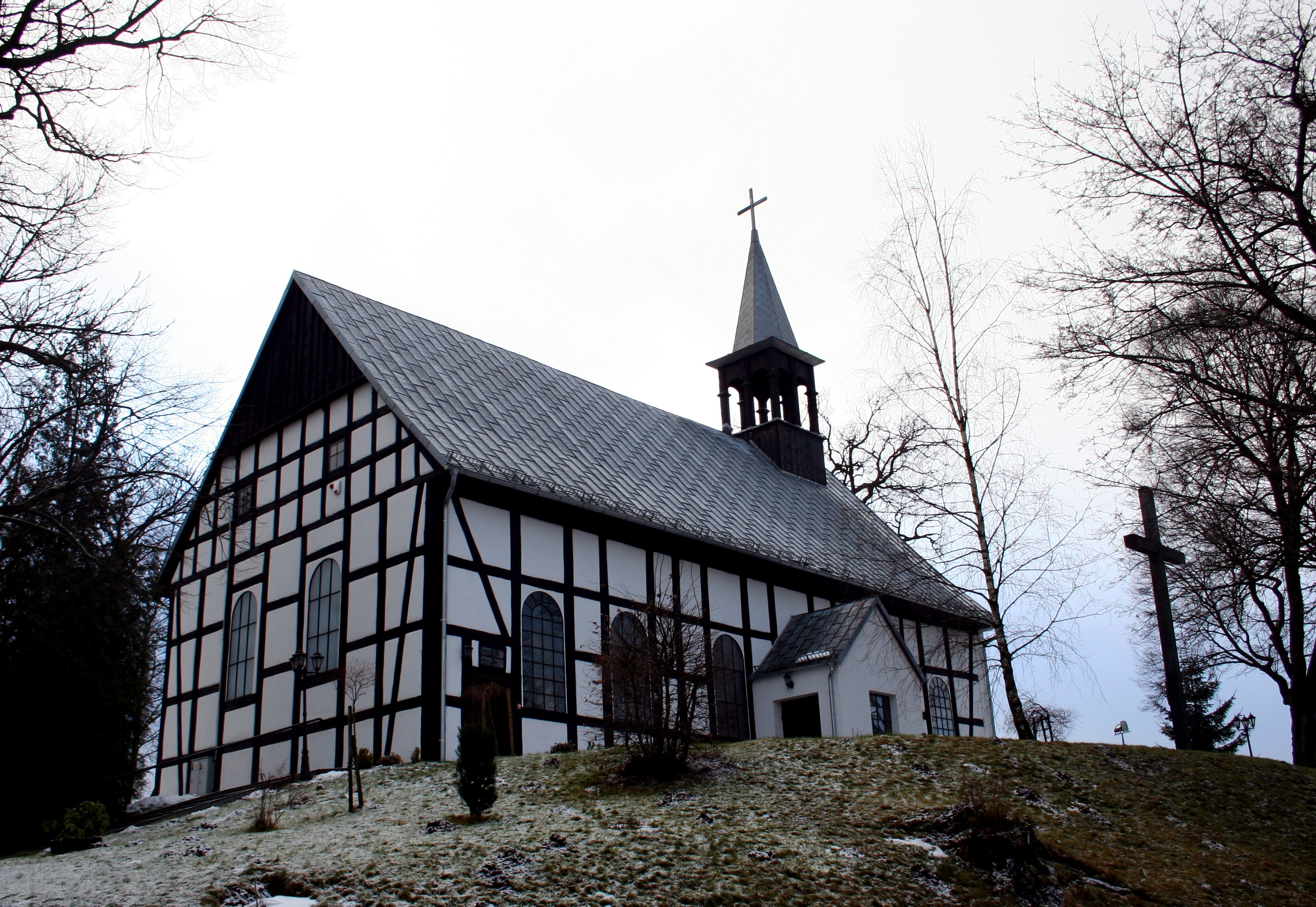 Kościół Chrystusa Króla w Kołczygłowach, w którym Otto von Bismarck brał ślub